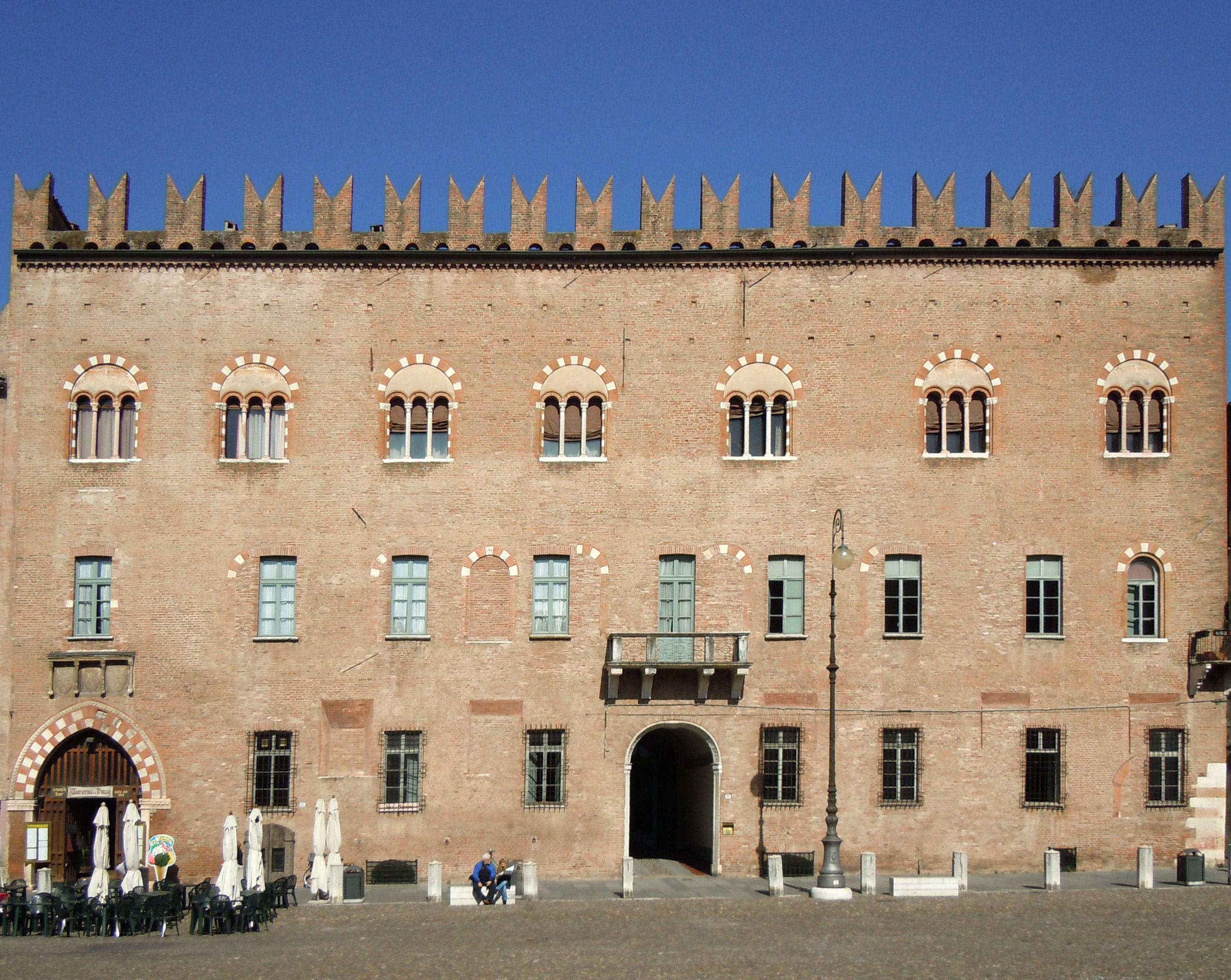 Mantova, Palazzo Bonacolsi-Castiglioni in piazza Sordello.